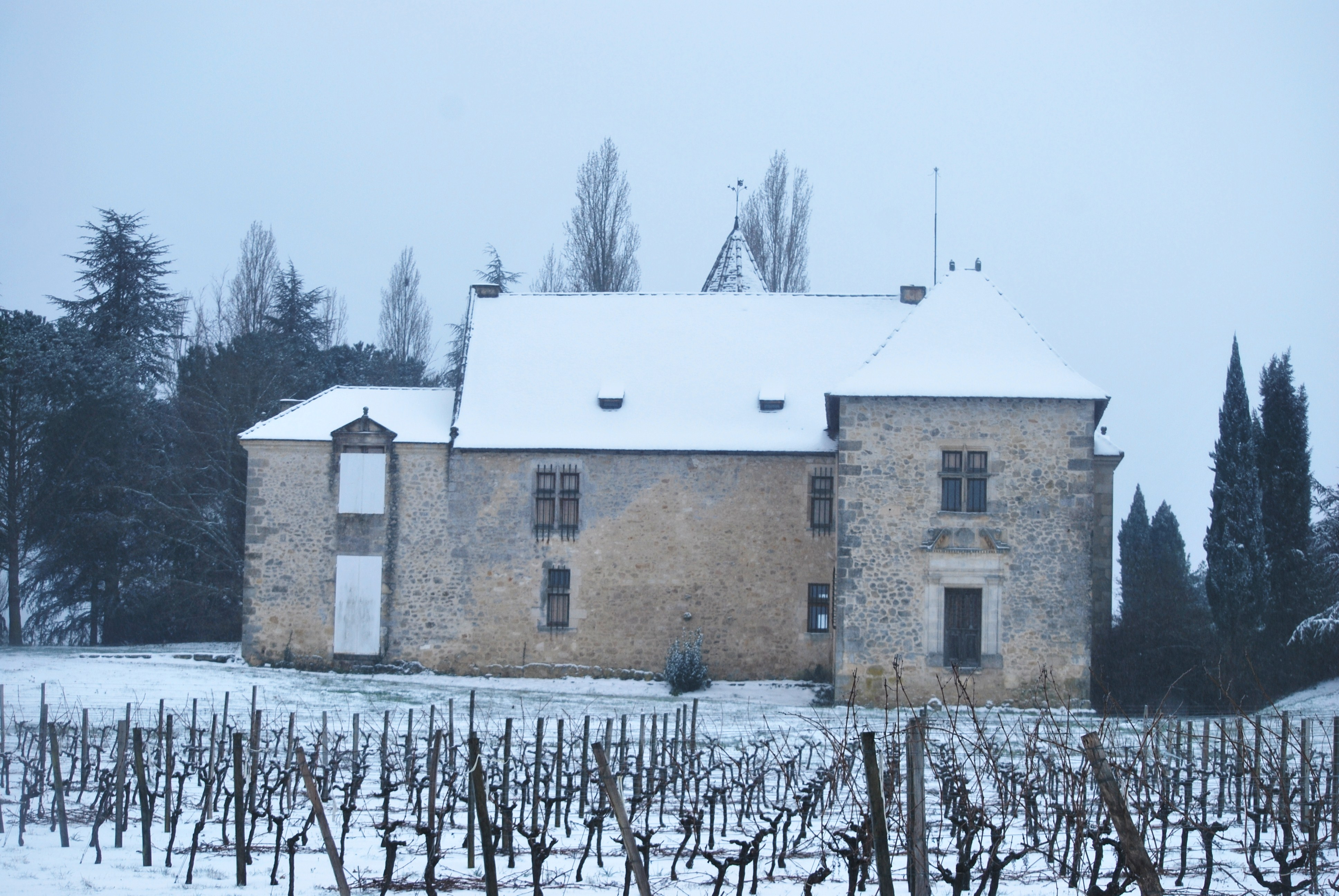 Chateau de l'Hérisson de Saint-Aubin-de-Branne sous la neige